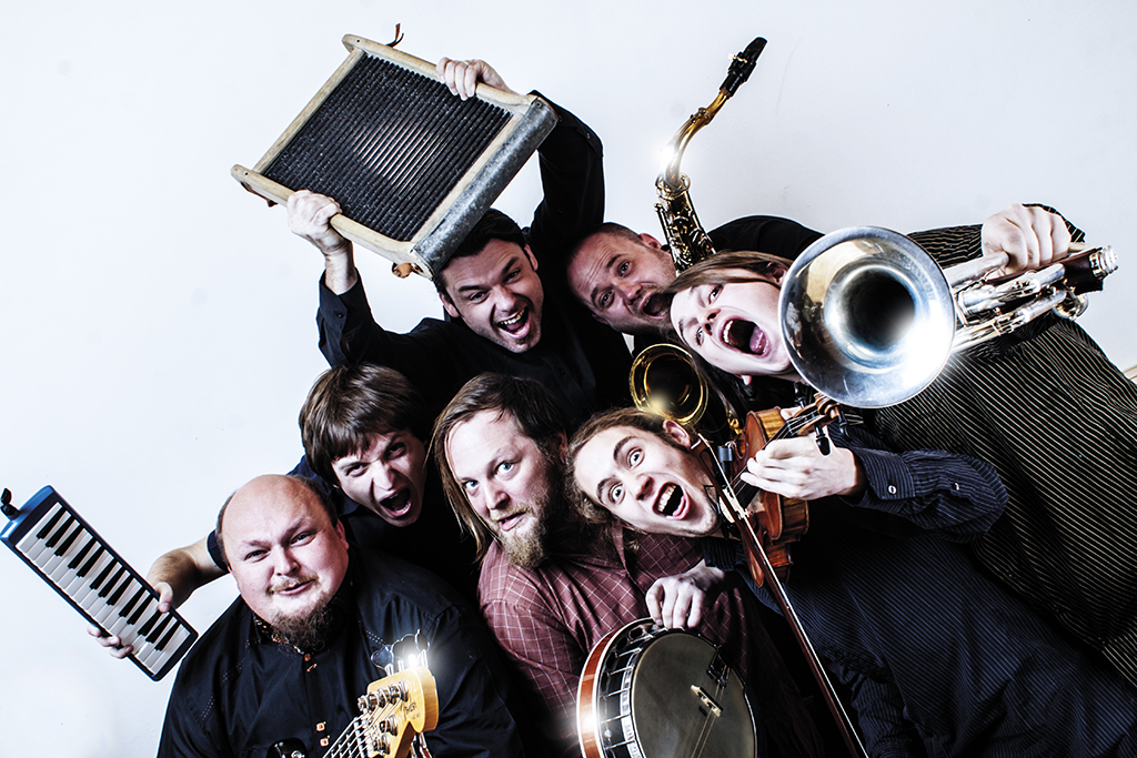 Poletime